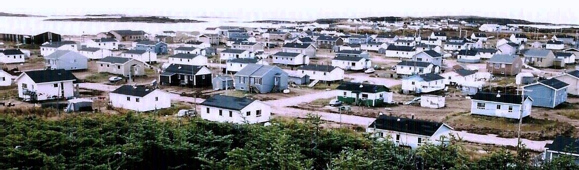 Village de La Romaine, vu des hauteurs boisées situées en arrière.